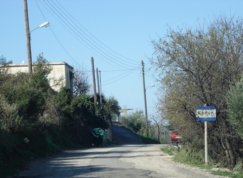 Krini Village Greece